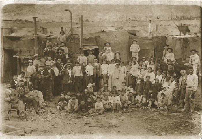 Imagen extraída del libro La masacre de la escuela Santa María de Iquique. Obreros celebrando matrimonio en Oficina Agua Santa.